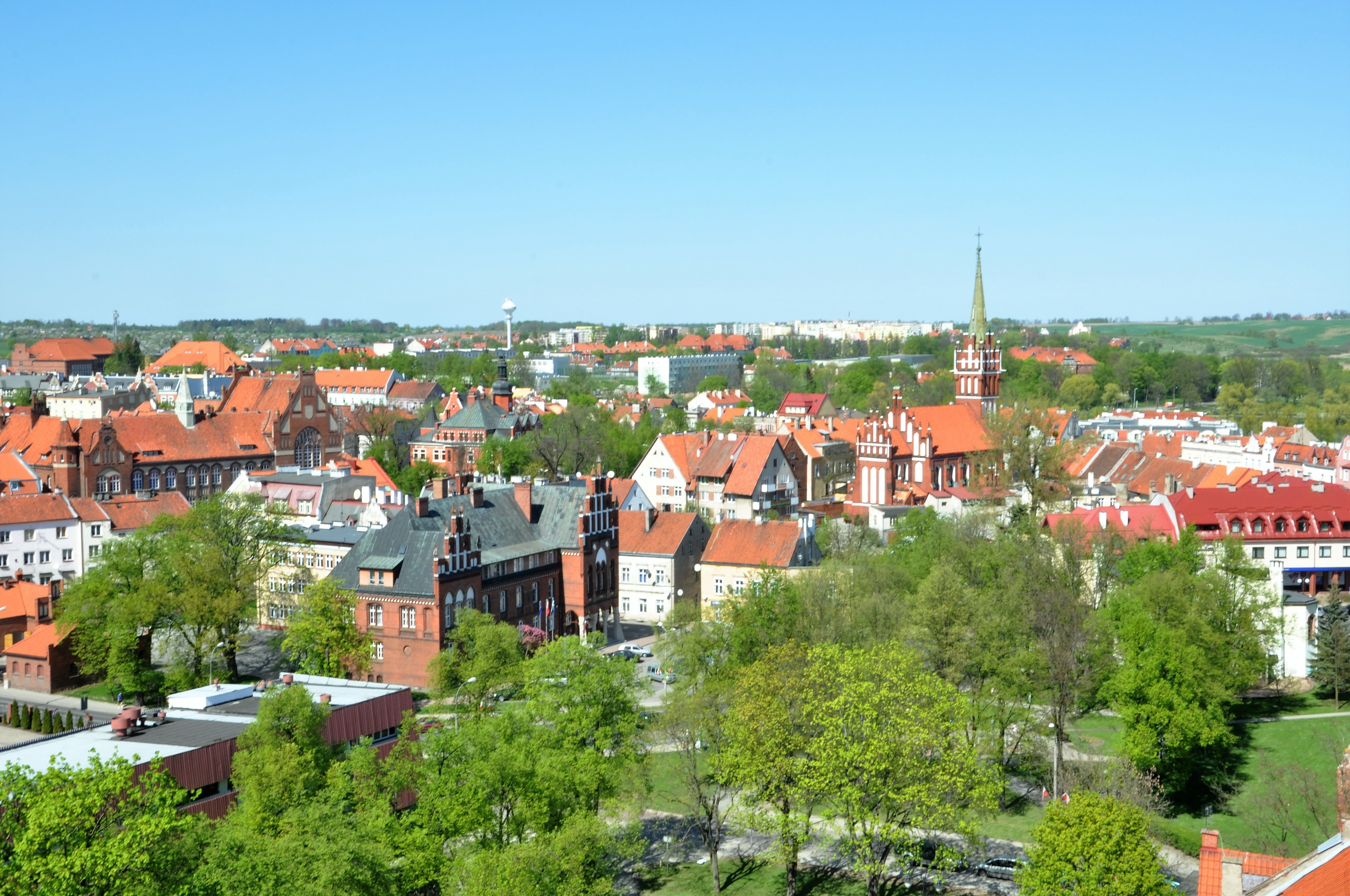 Kętrzyn, Stare Miasto - układ urbanistyczny z murami i obszarem 50 m, 1 poł. XIV; widok z wieży bazyliki św. Jerzego